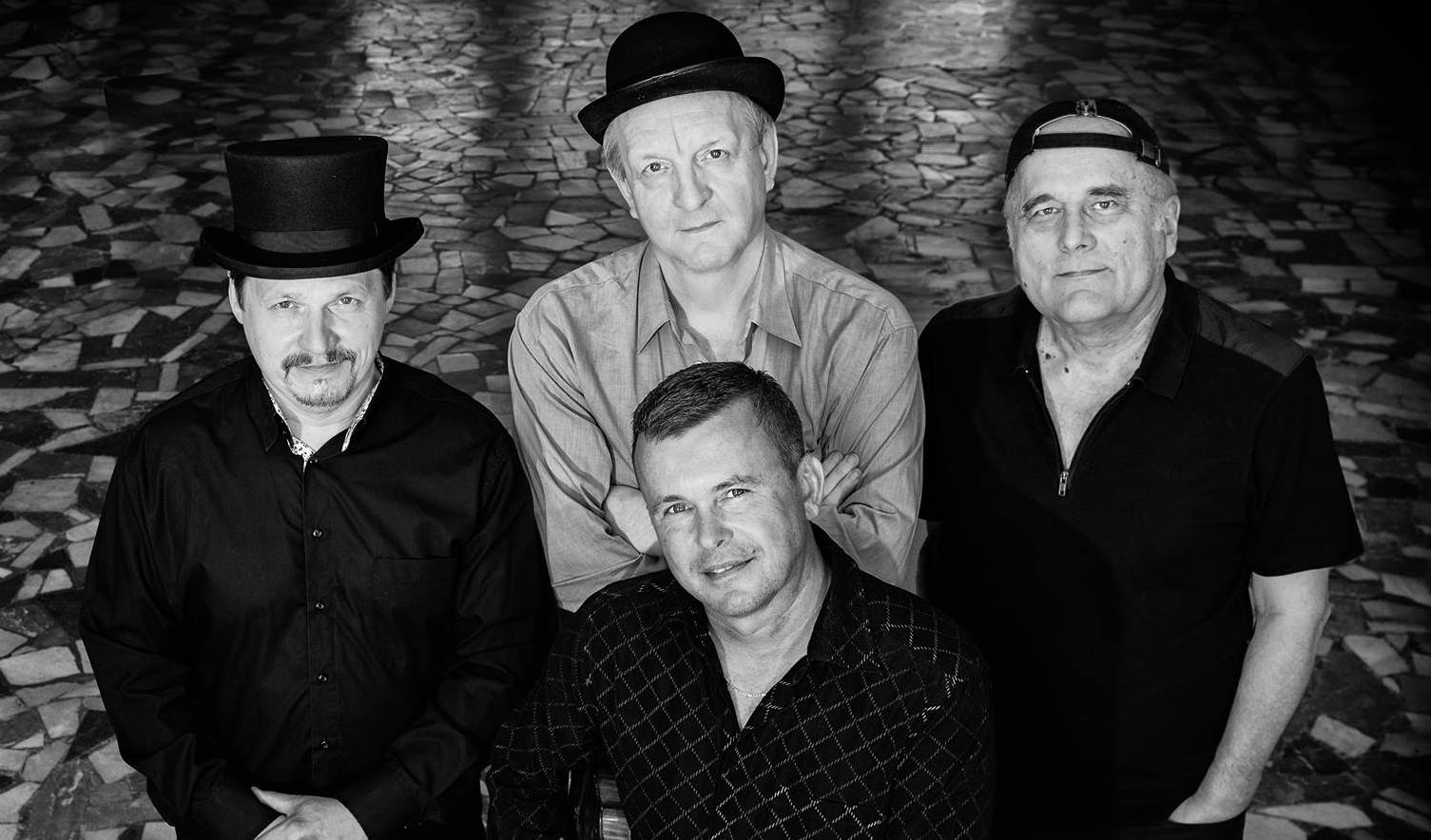 Hladolet